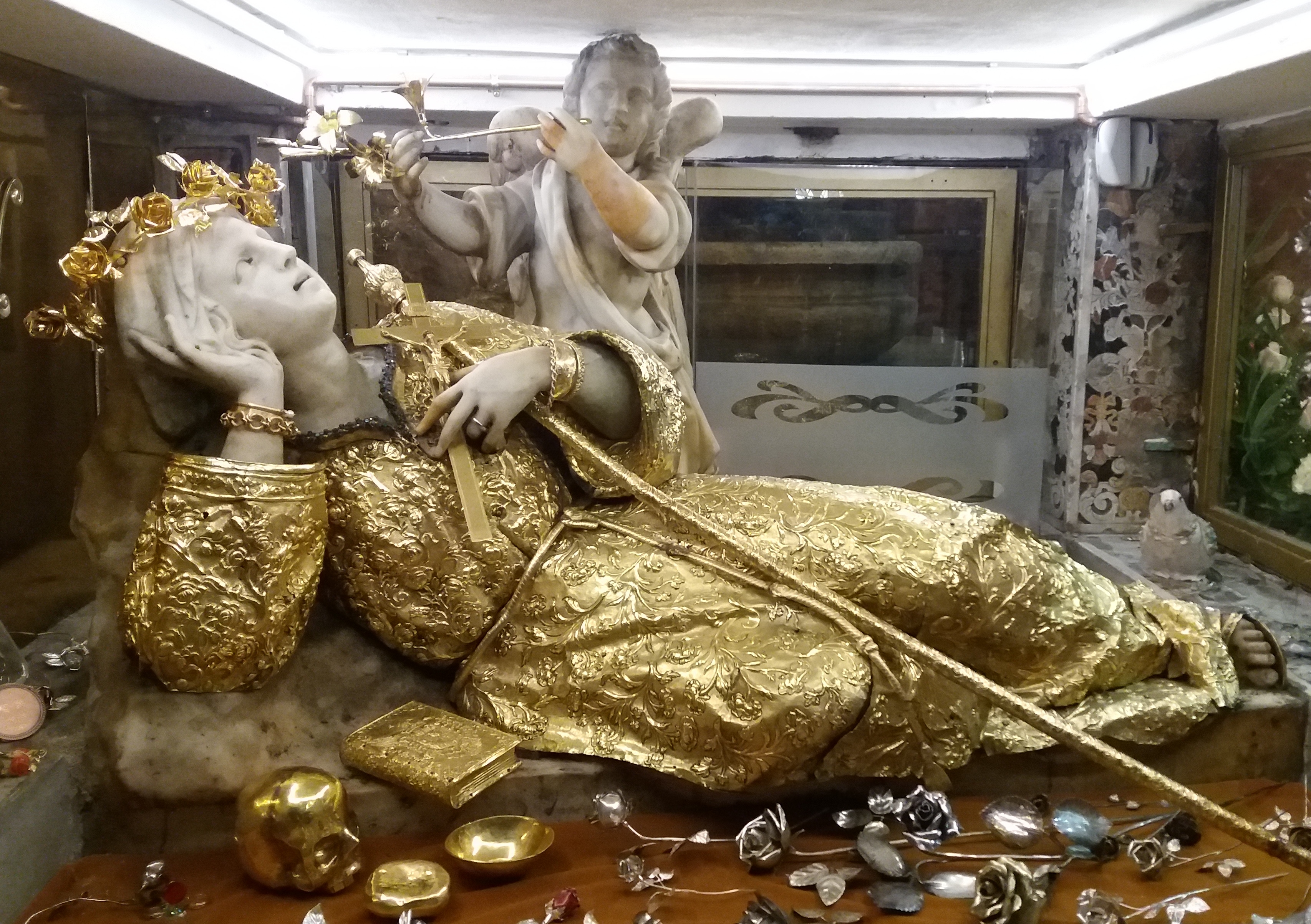 La Statua, in marmo bianco di Carrara, è posta sotto l'altare dedicato a Santa Rosalia all'interno della sacra grotta del Santuario a lei dedicato sul Montepellegrino a Palermo.